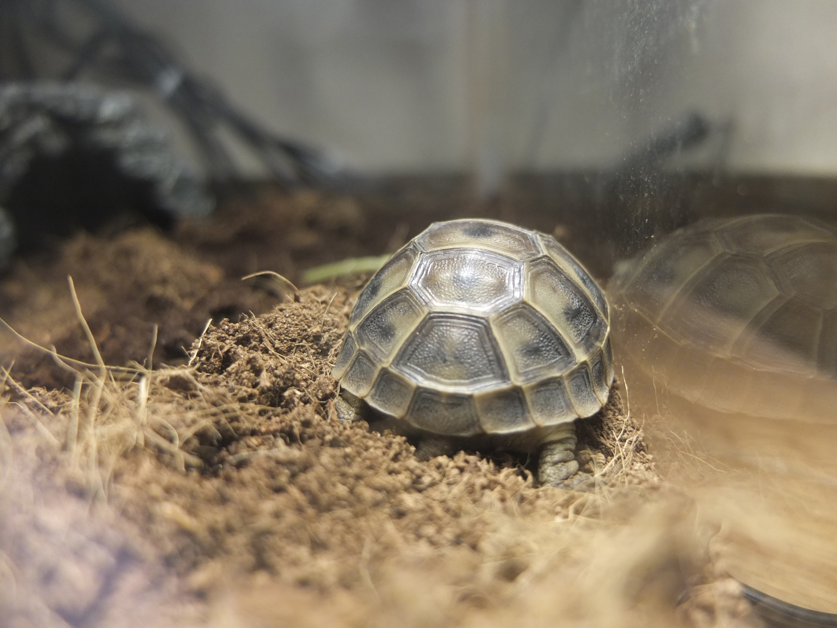 個体はイベラギリシャリクガメ 甲羅DSF2679と同じ。 後ろから撮影。 イベラギリシャの臀甲板が一枚ということがわかる画像です。